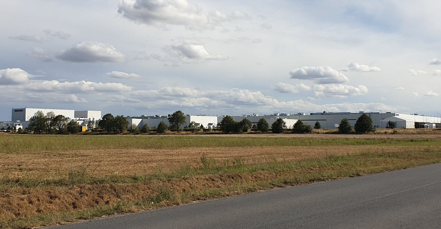 Stargard. Bridgestone